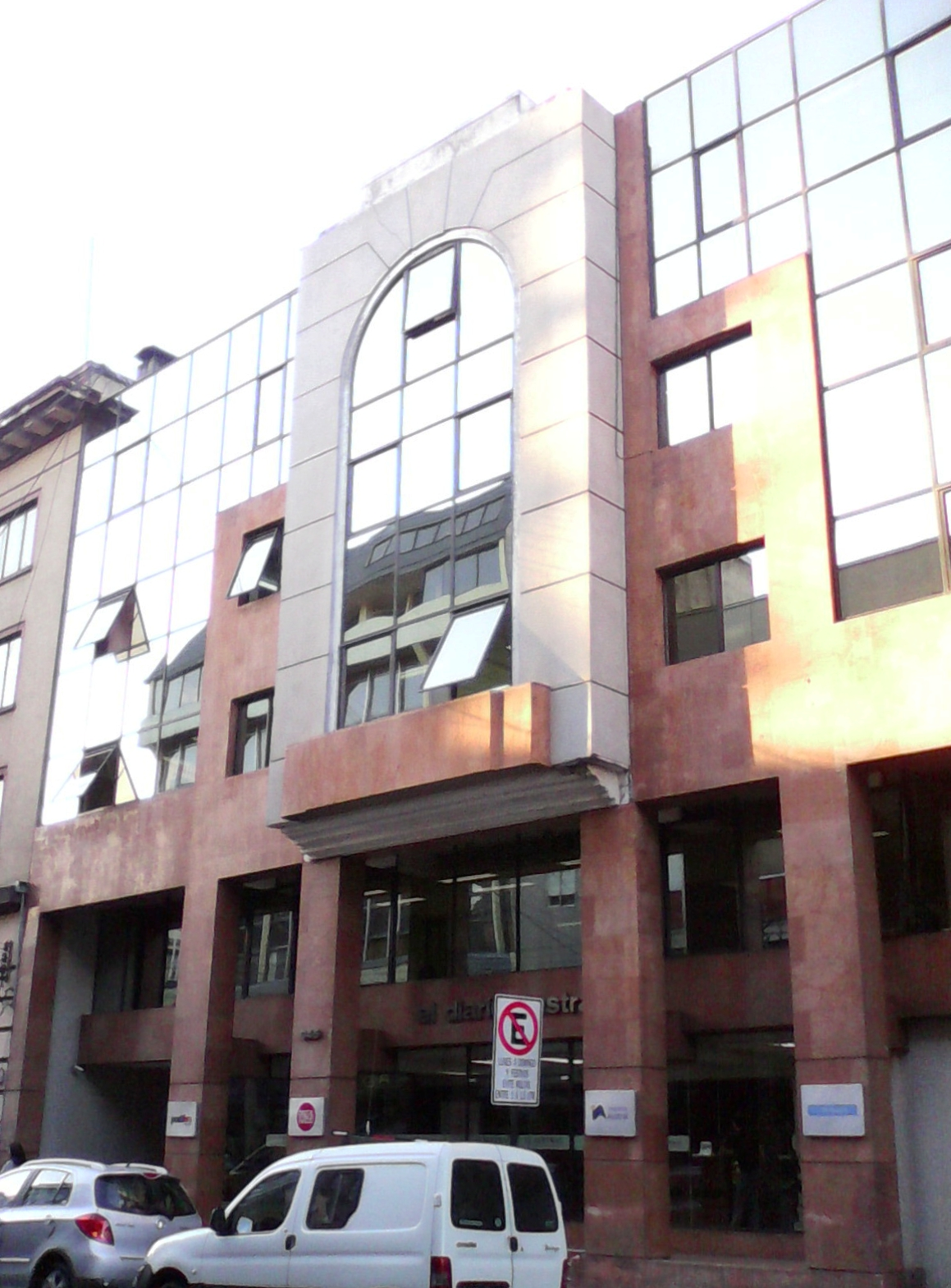 Edificio del diario El Austral, en calle Antonio Varas 945 de la ciudad de Temuco, Chile.